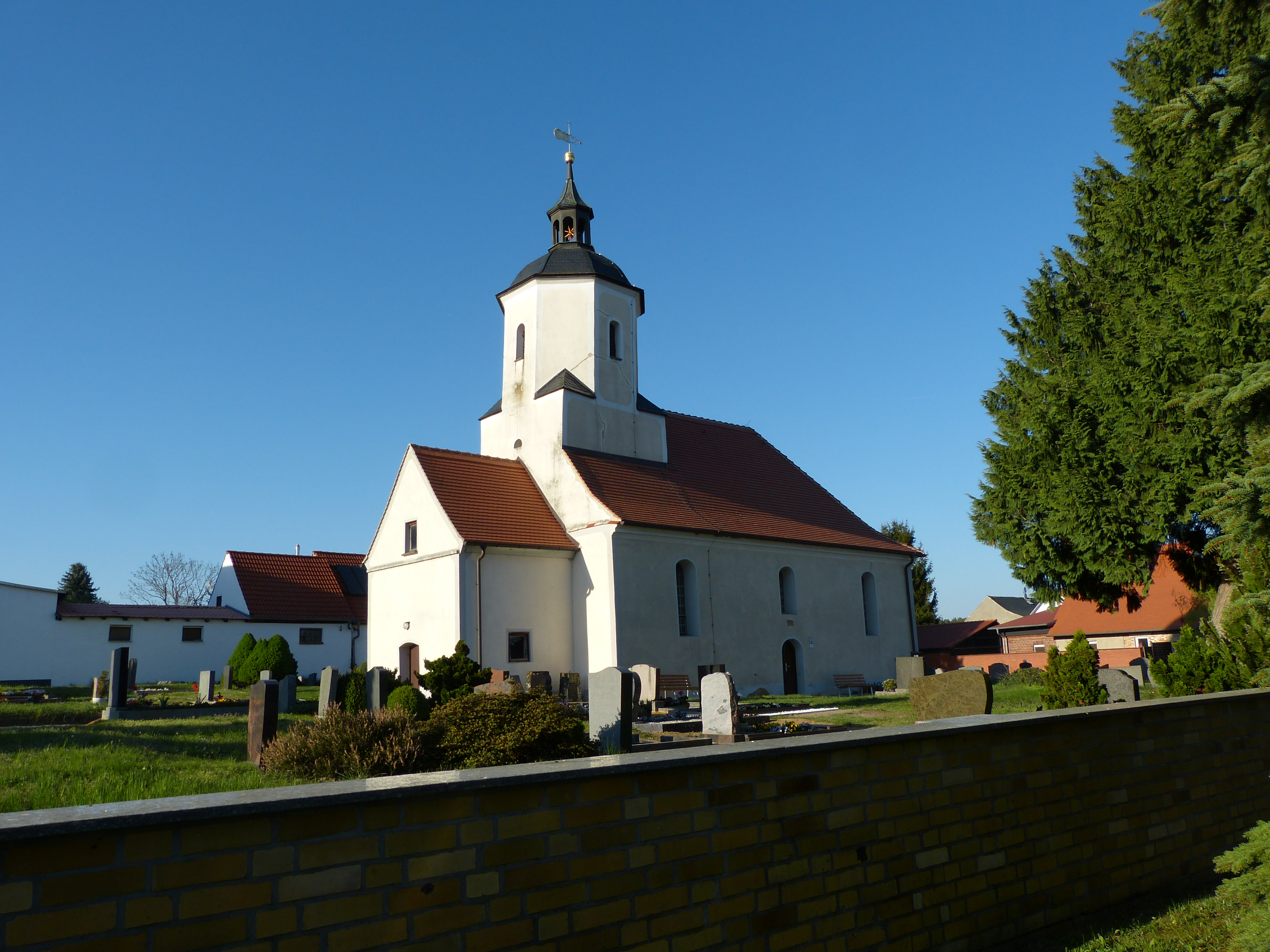 Das schlichte Bauwerk stammt aus den Jahren 1664 - 1669. Über dem Westteil des rechteckigen Putzbaus befindet sich ein Dachturm mit geschweifter Haube und Laterne.